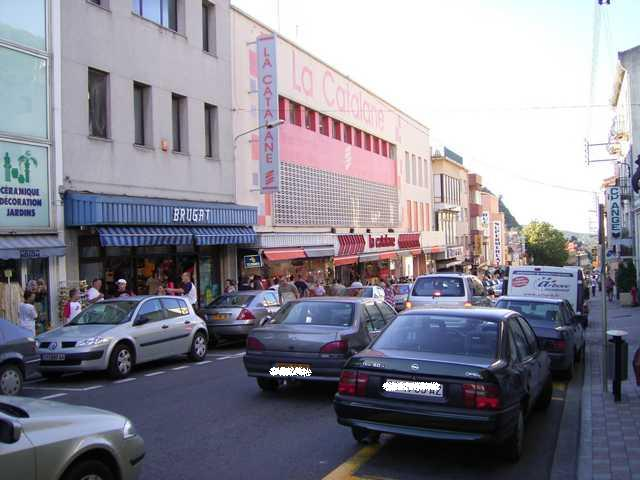 Le Perthus